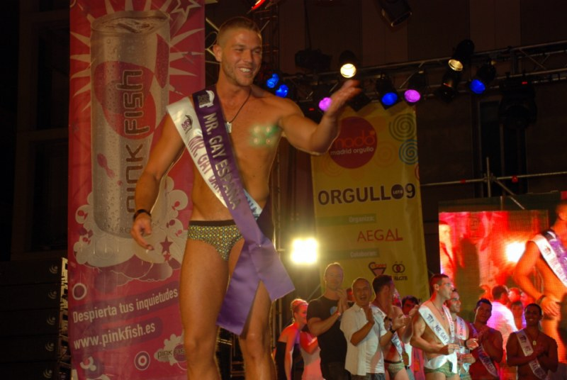 Mr. Gay Europe 2009